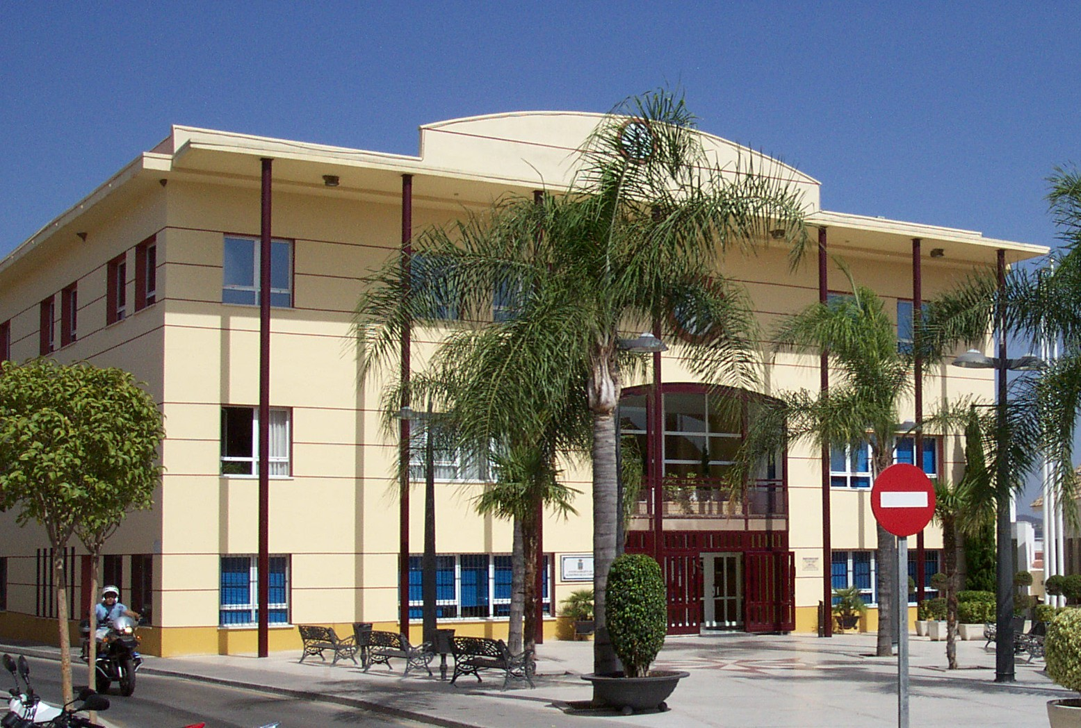 Alhaurín de la Torre, Spain.